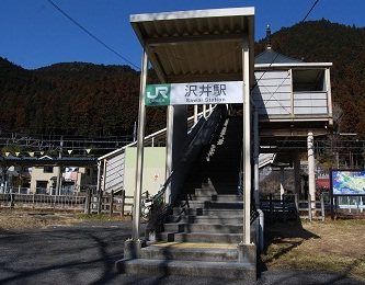 JR青梅線沢井駅南口